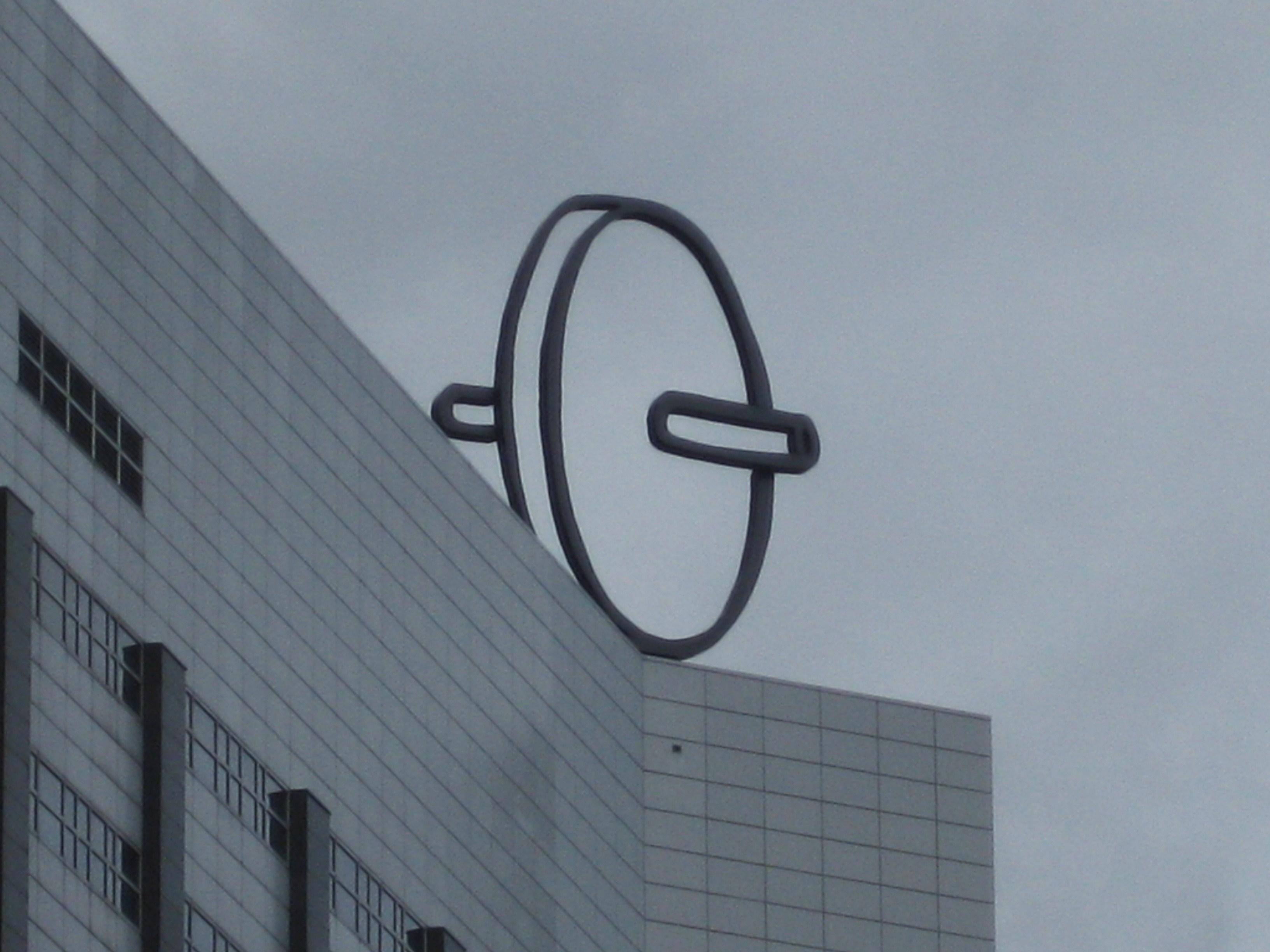 Het Wiel van Jeroen Henneman, in 1996 geplaatst op het Belastingkantoor aan de A10. Het Wiel is eigenlijk een munt met een as er door. De as staat voor de Belastingdienst